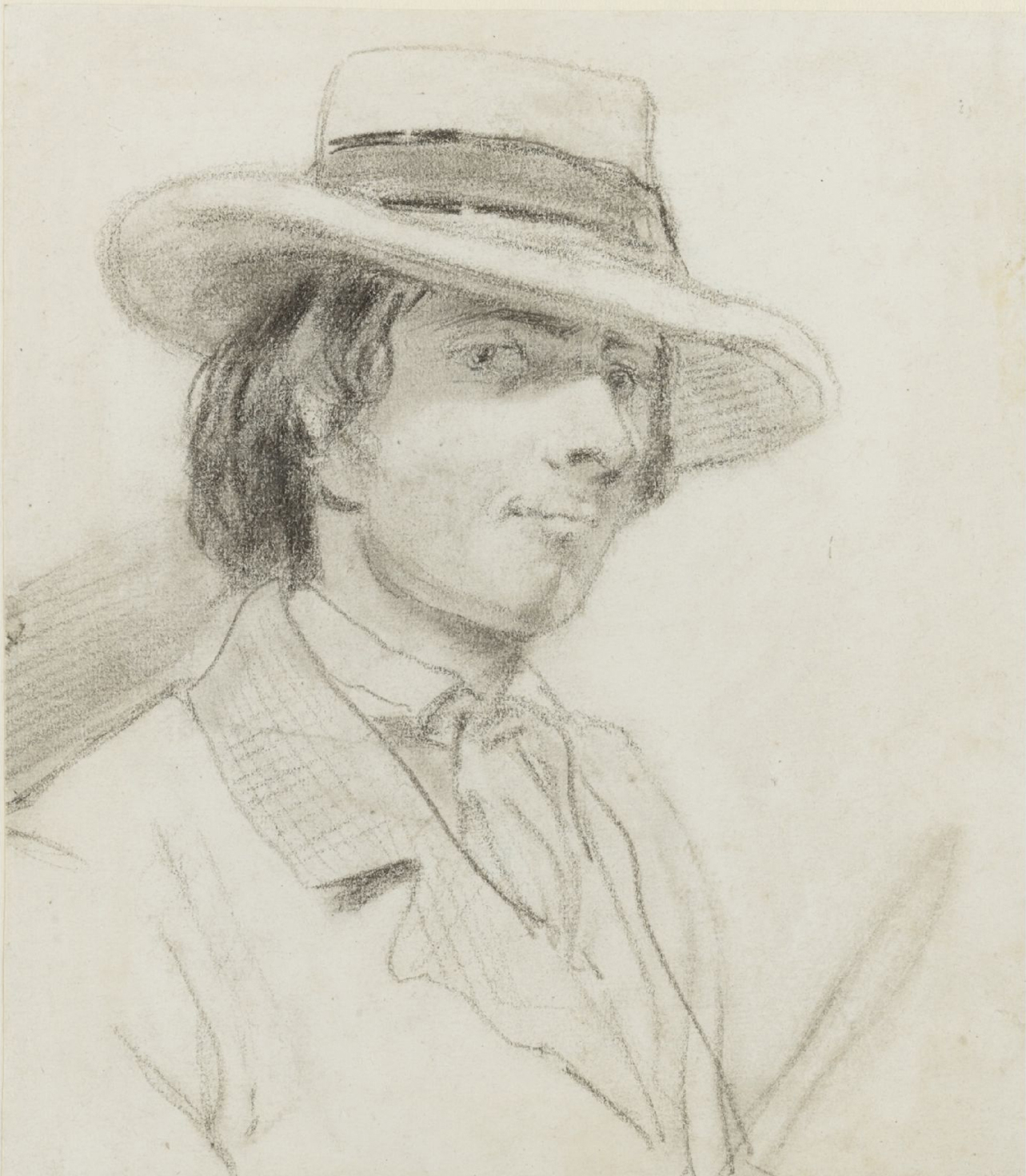 Self-portrait